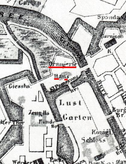 Lage des ehemaligen Orangerie-Hauses in Berlin 1710.